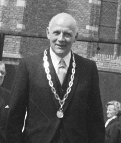 ZKH Prins Bernhard opent uitbreiding van het Vestingmuseum te Naarden Prins Bernhard, naast hem burgemeester N.J.C. Cramer, wandelt door Naarden